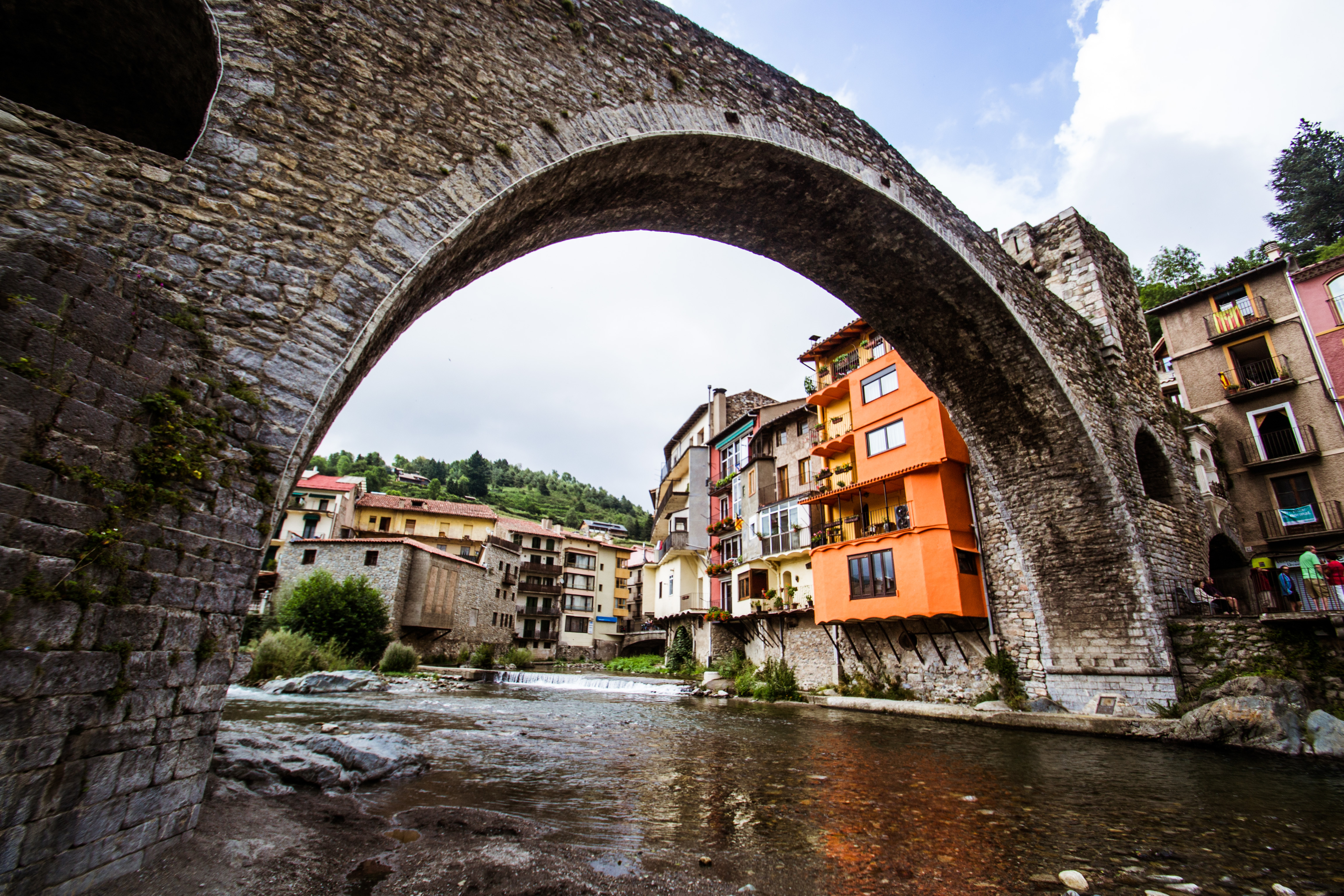 Detalle de la arcada desde el lecho del río Ter.